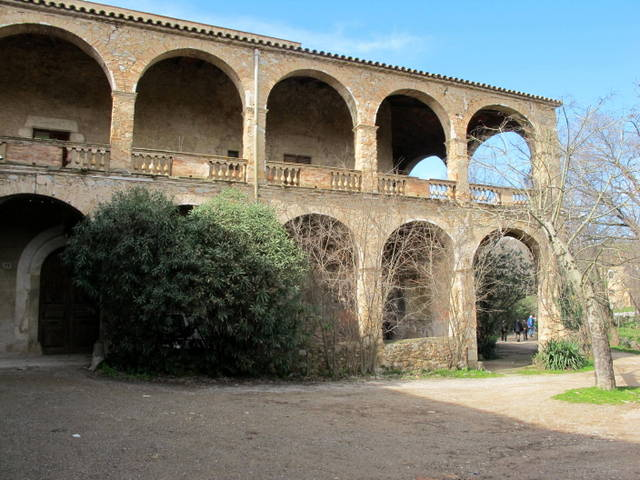 castell de Medinyà al Gironés - Catalunya